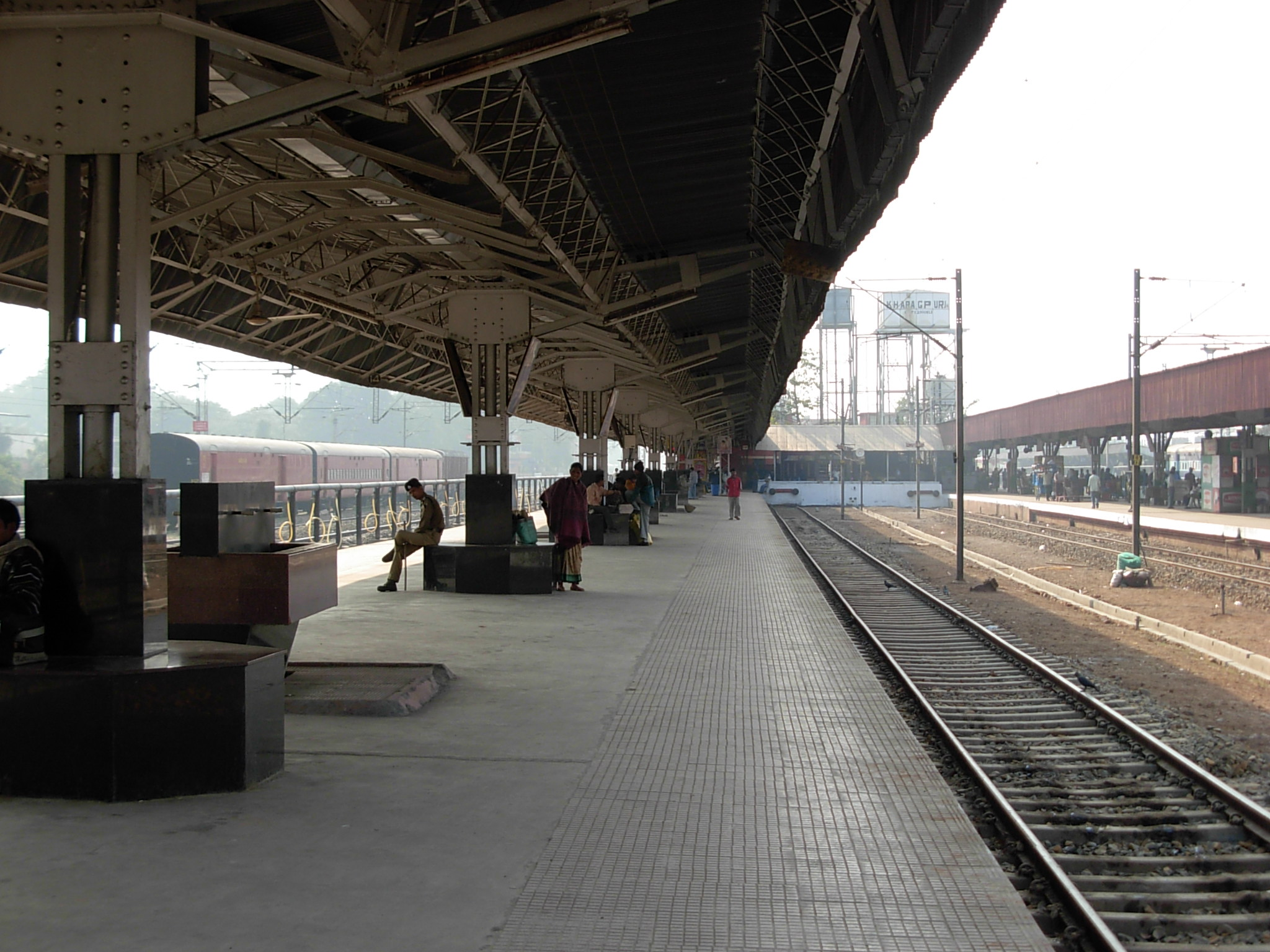 Kharagpur's Railway Station